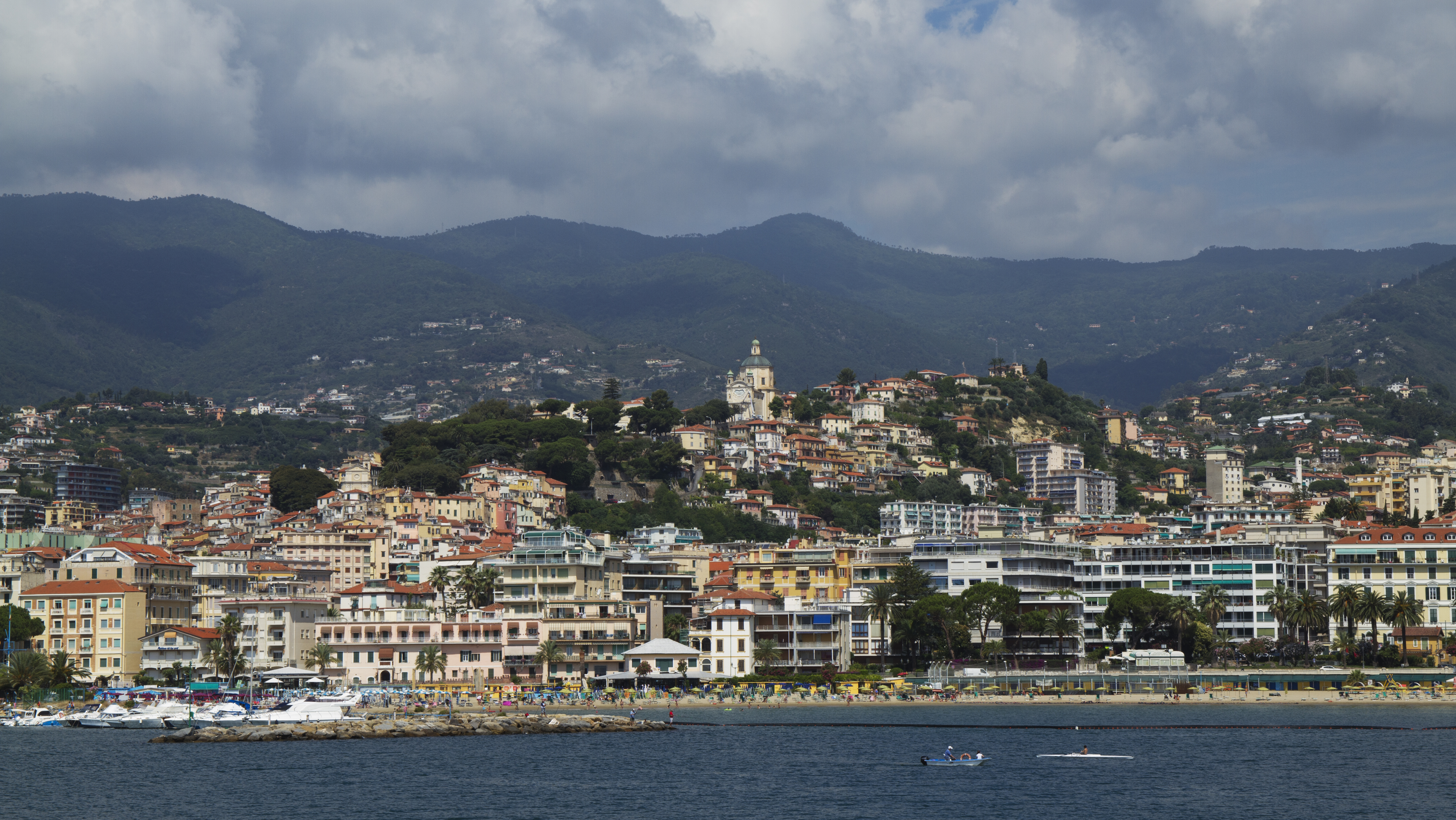 18038 Sanremo IM, Italy